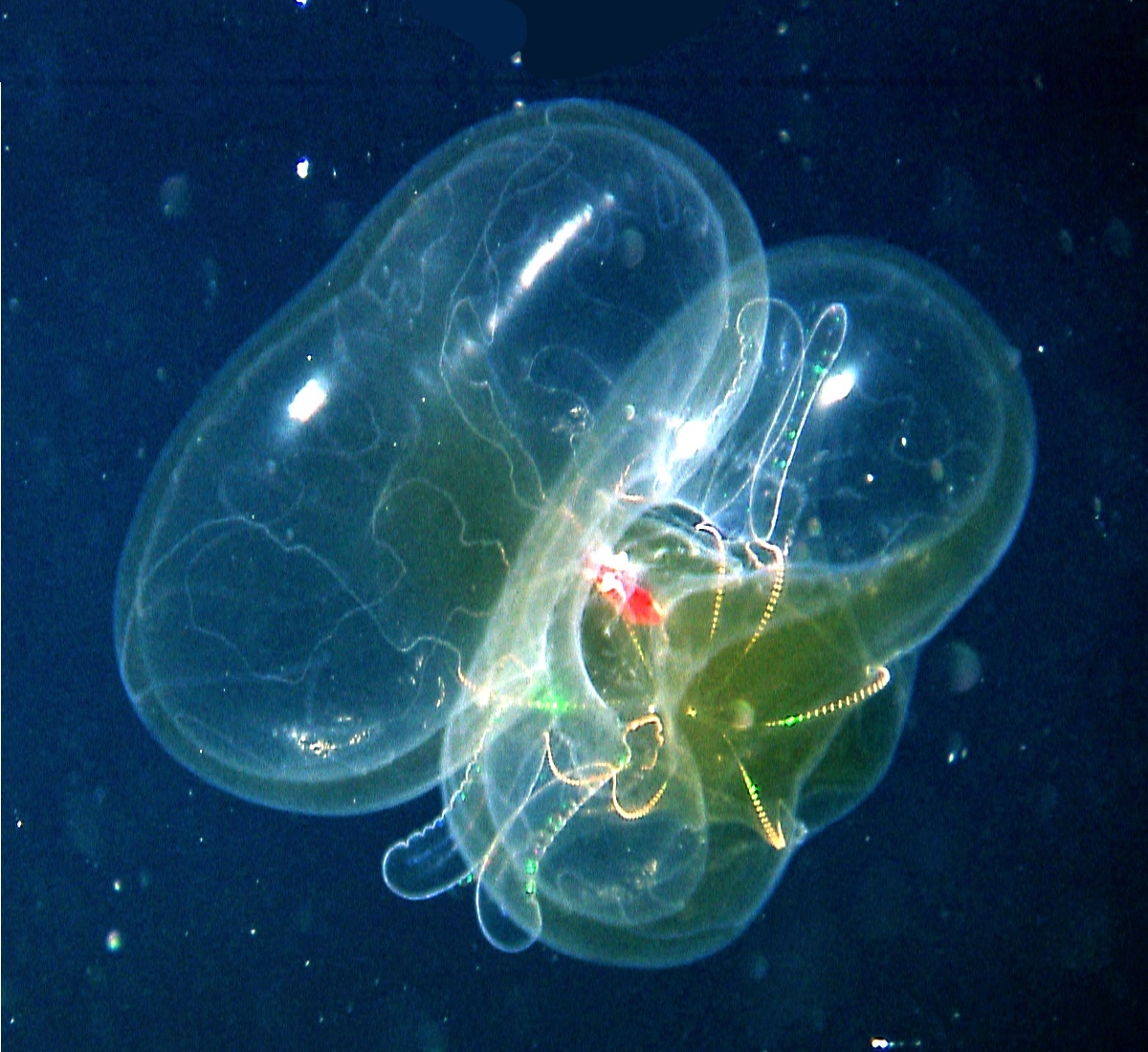 Lobata sp. (Ctenophora) en el golfo de México. 2012